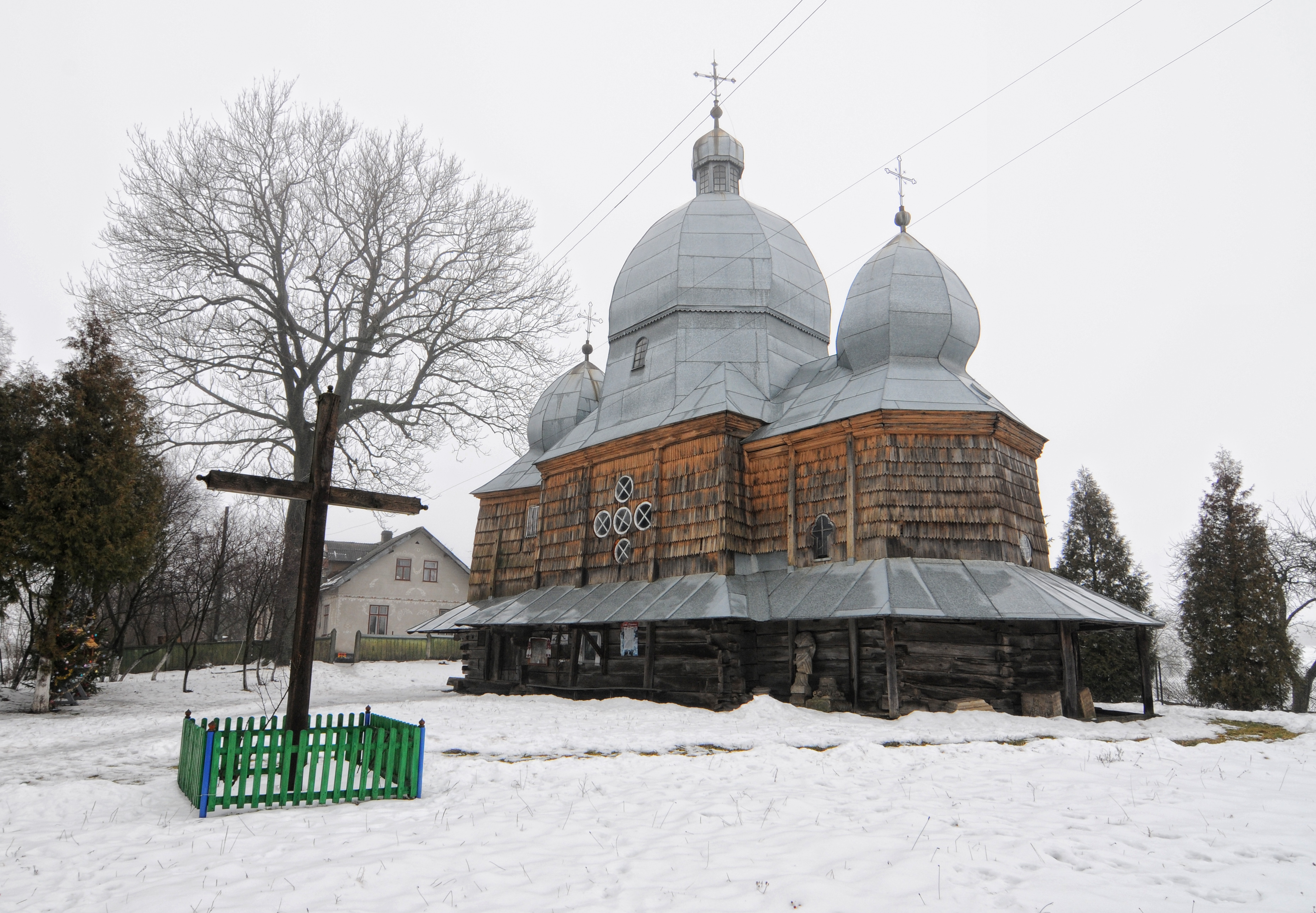 Поморяни Церква Собору Пресвятої Богородиці